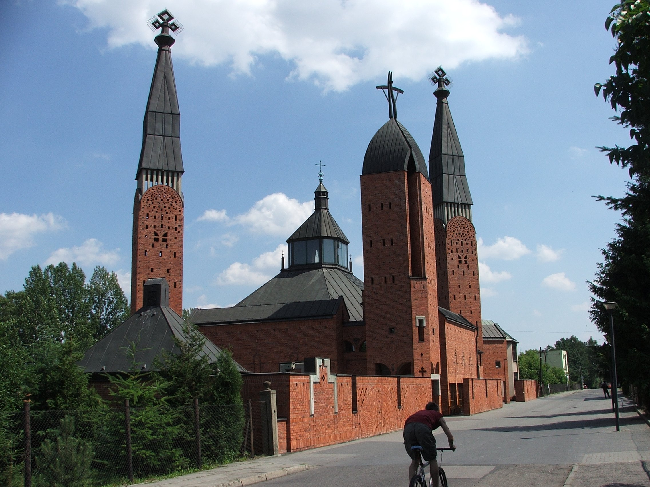 The Church of Jezus Chrystus Odkupiciel in Czechowice-Dziedzice, Poland.